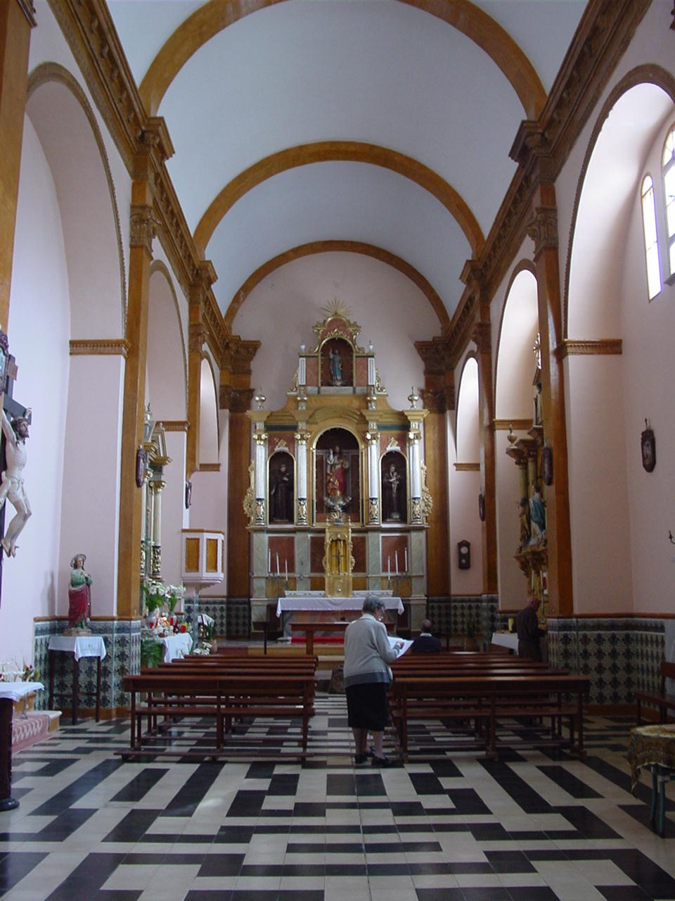 Interior de uma igreja católica em Asilah.